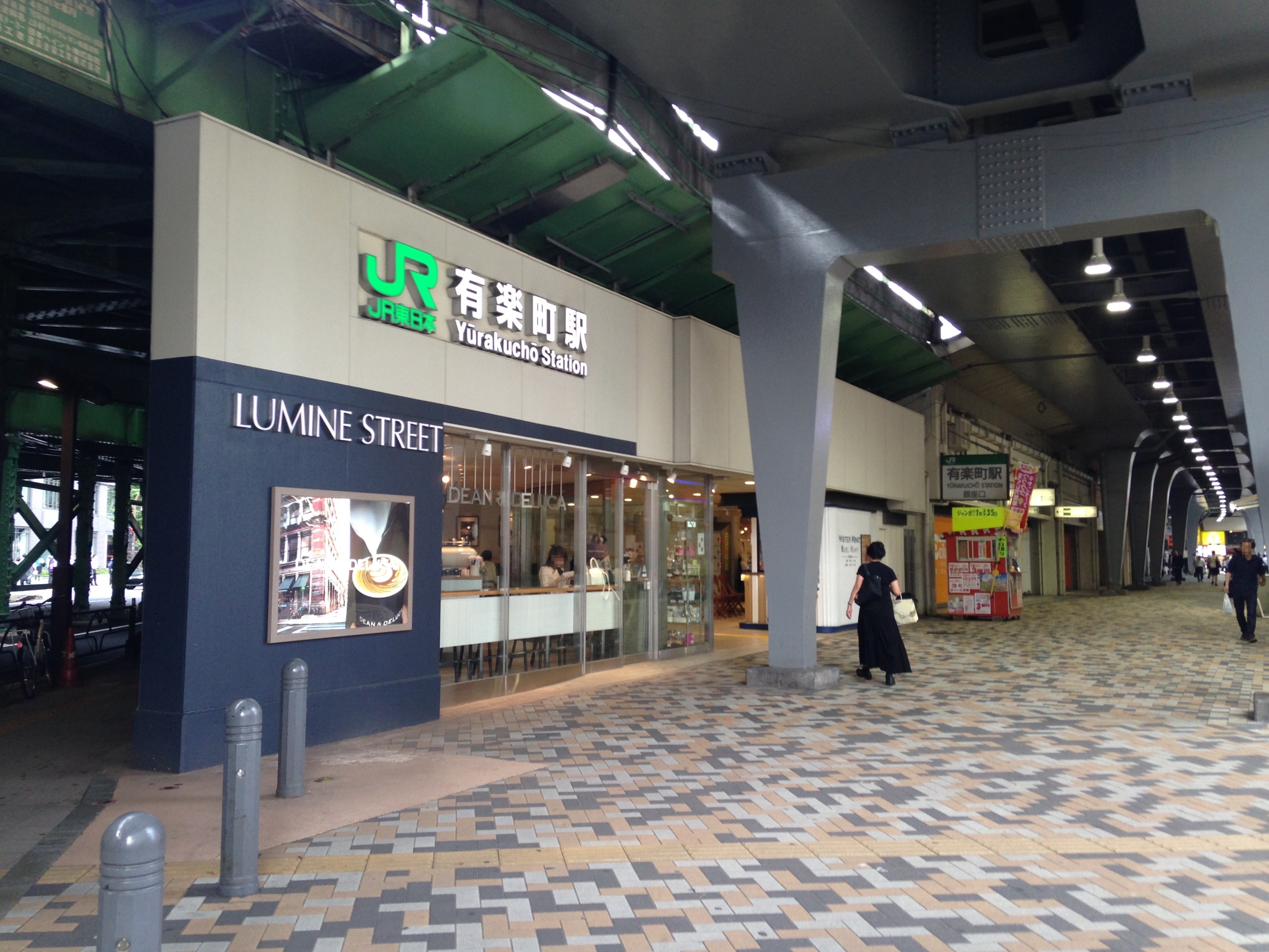 有楽町駅・銀座口